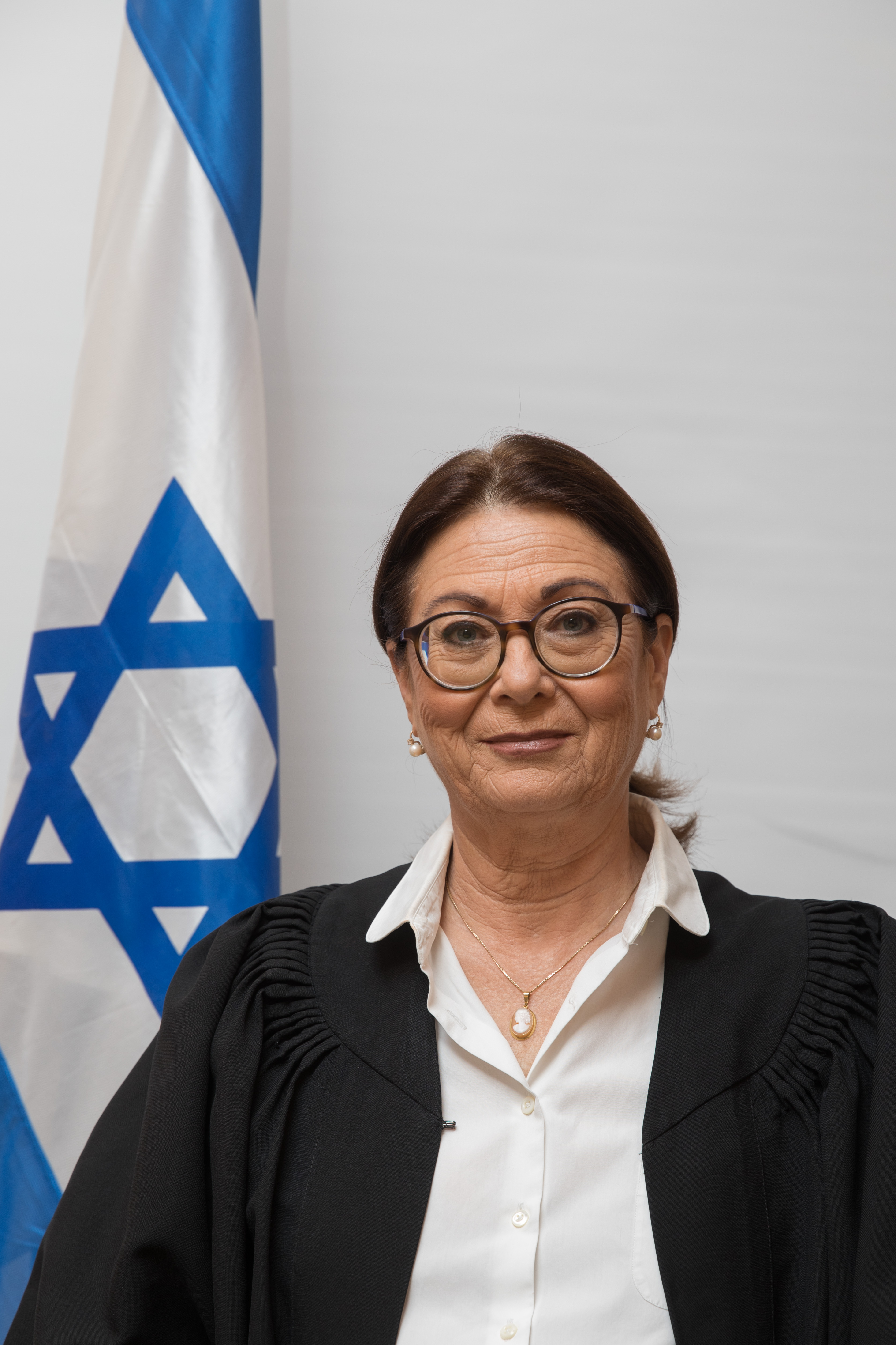 השופטת אסתר חיות, נשיאת בית המשפט העליון בישראל החל מ-26 באוקטובר 2017